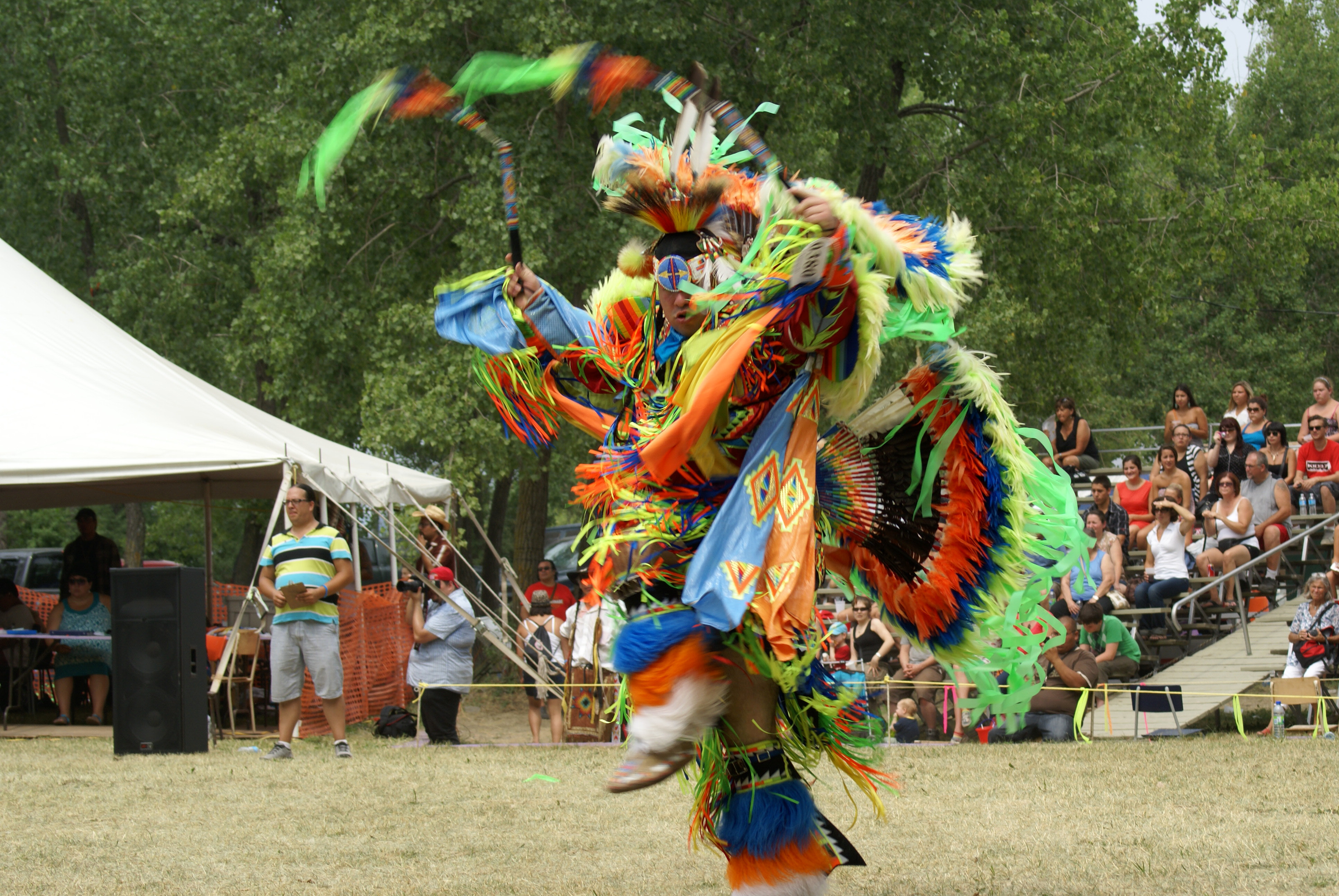 Danseur fancy pow-wow